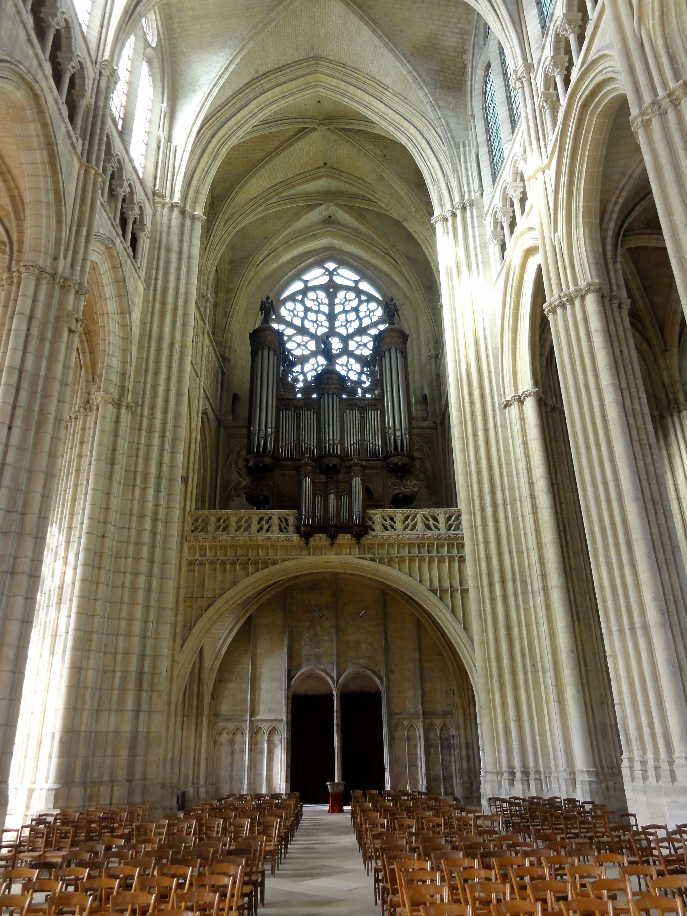 Nef, vue vers l'ouest.